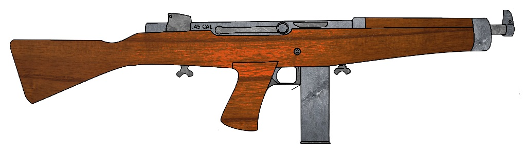 Rappresentazione grafica della pistola mitragliatrice T2, realizzata con Inkscape e Photoshop.